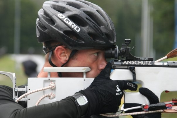 See Title